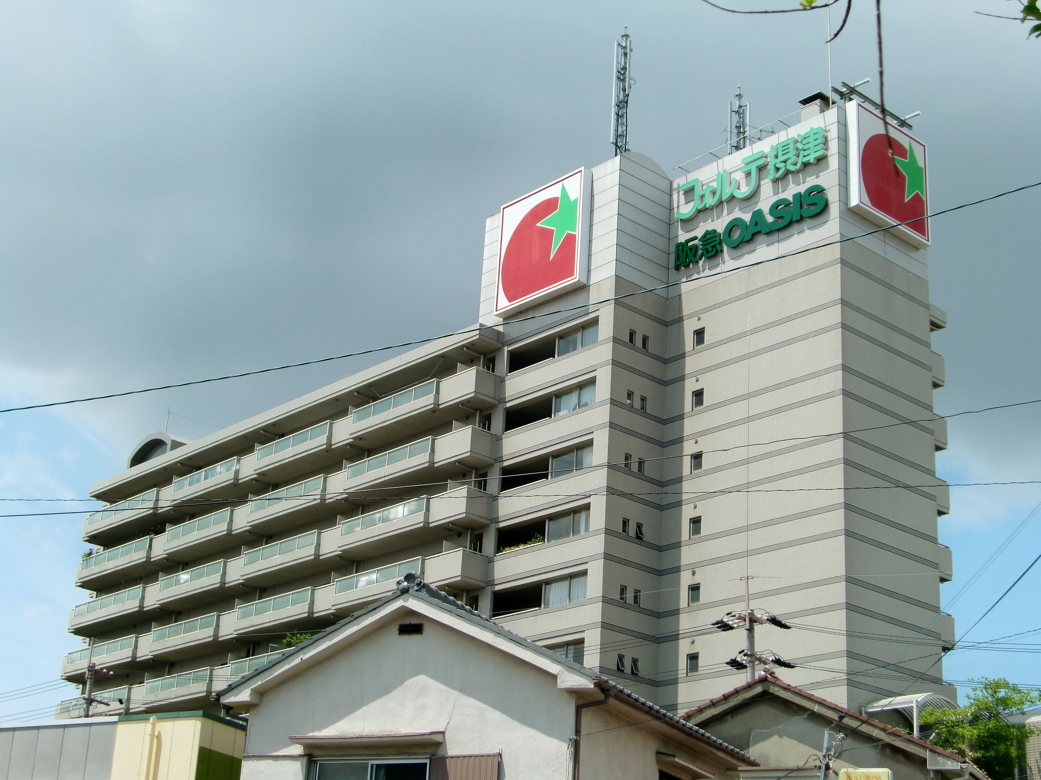 Forte Settsu,Senriokahigashi Settsu-City Osaka Japan.